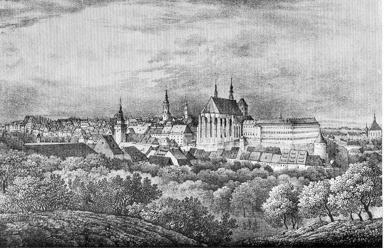 Historische Ansicht von Görlitz in Sachsen. Stahlstich.